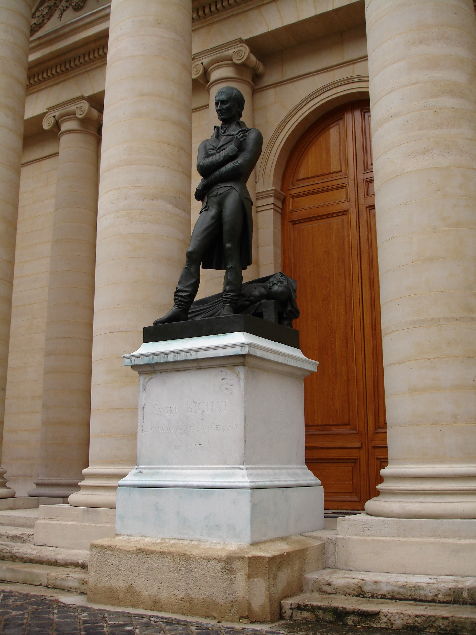 Statua di Xavier Bichat, Cour d'honneur de l'Université René Descartes, Paris, France